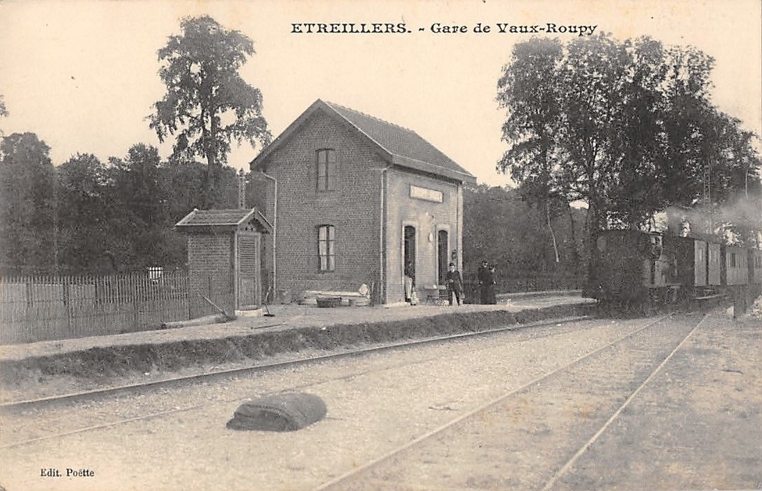 La gare d'Etreillers vers 1910.